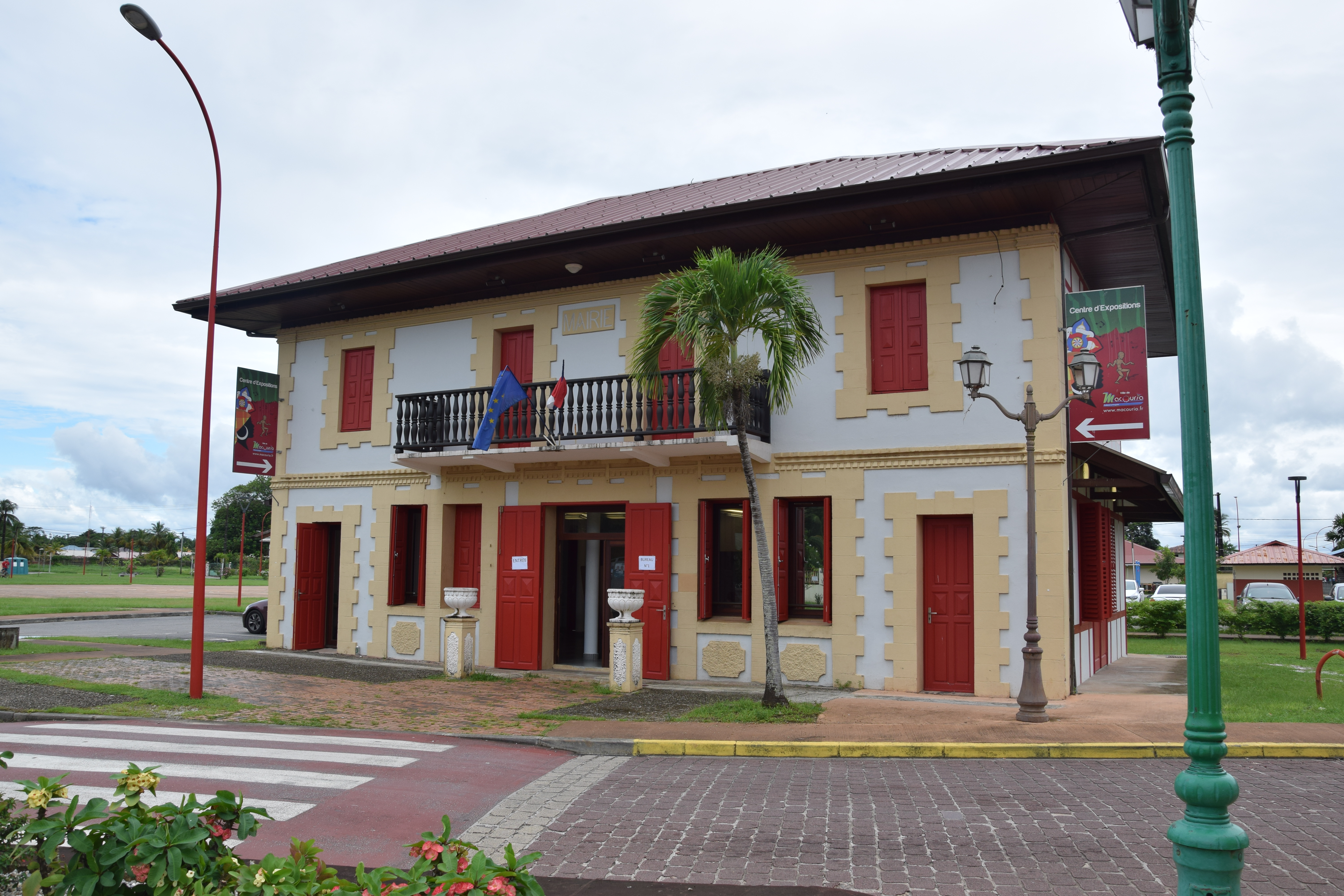 Mairie Tonate Macouria